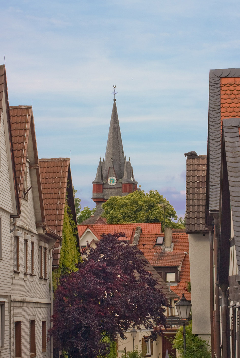 Evangelische „St. Nikolai-Kirche“ in Altenstadt, Hessen, in Deutschland.